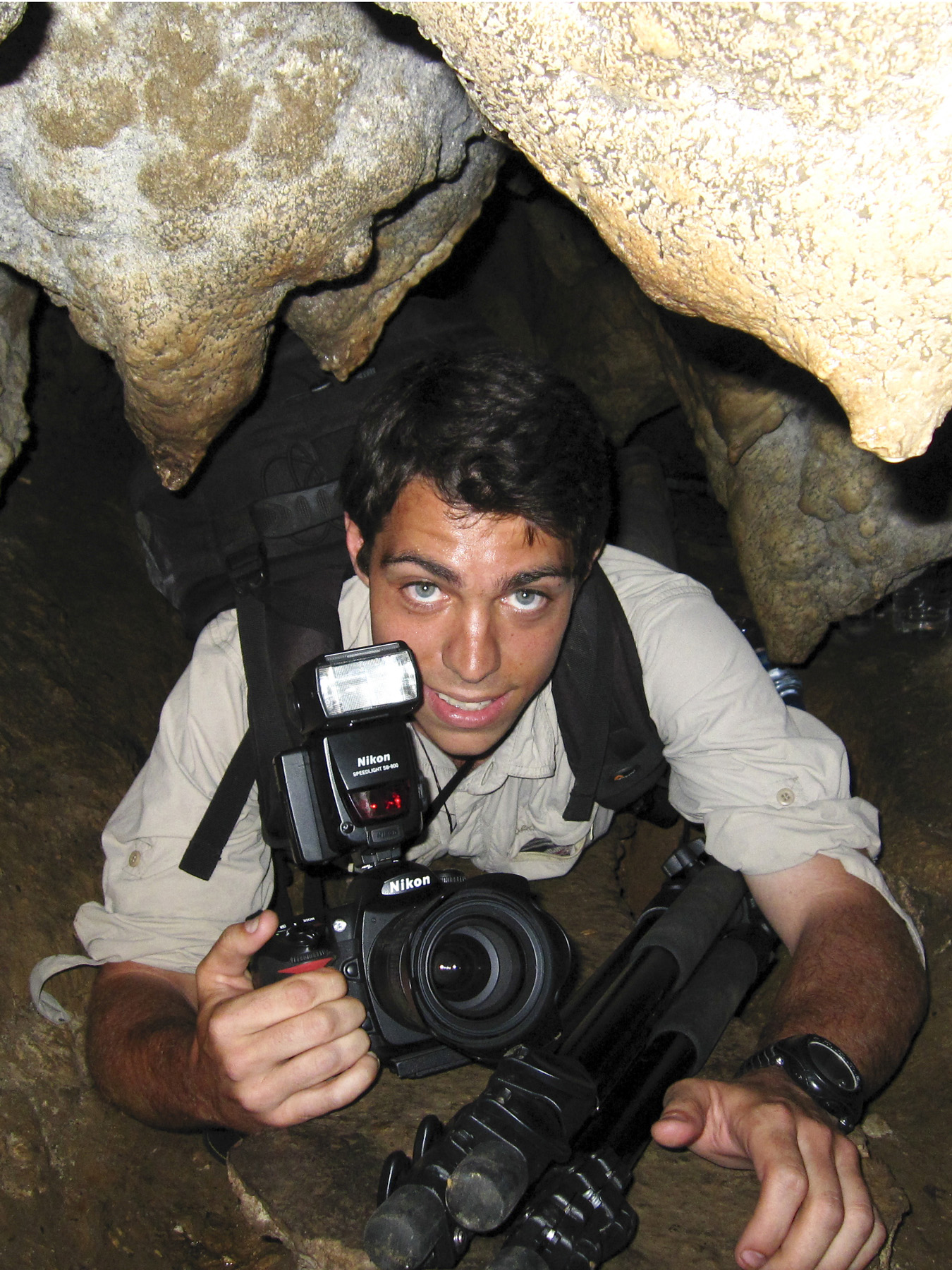 Joan de la Malla durante uno de sus trabajos fotográficos